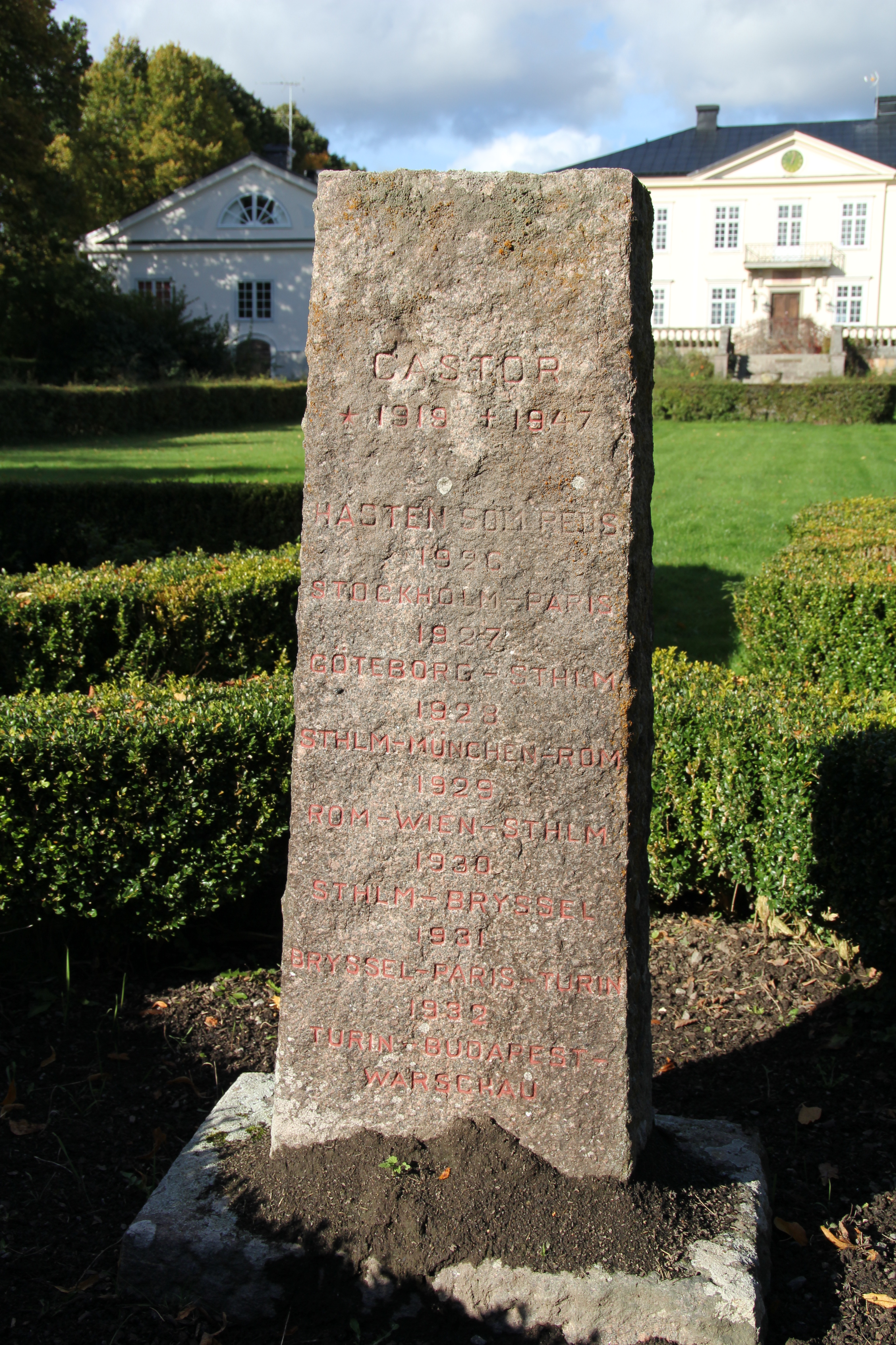 Minnessten över hästen Castor på Lindö gård i Runtuna socken, Nyköping.